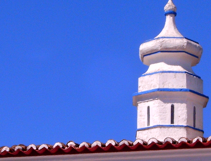 paisagem tipica